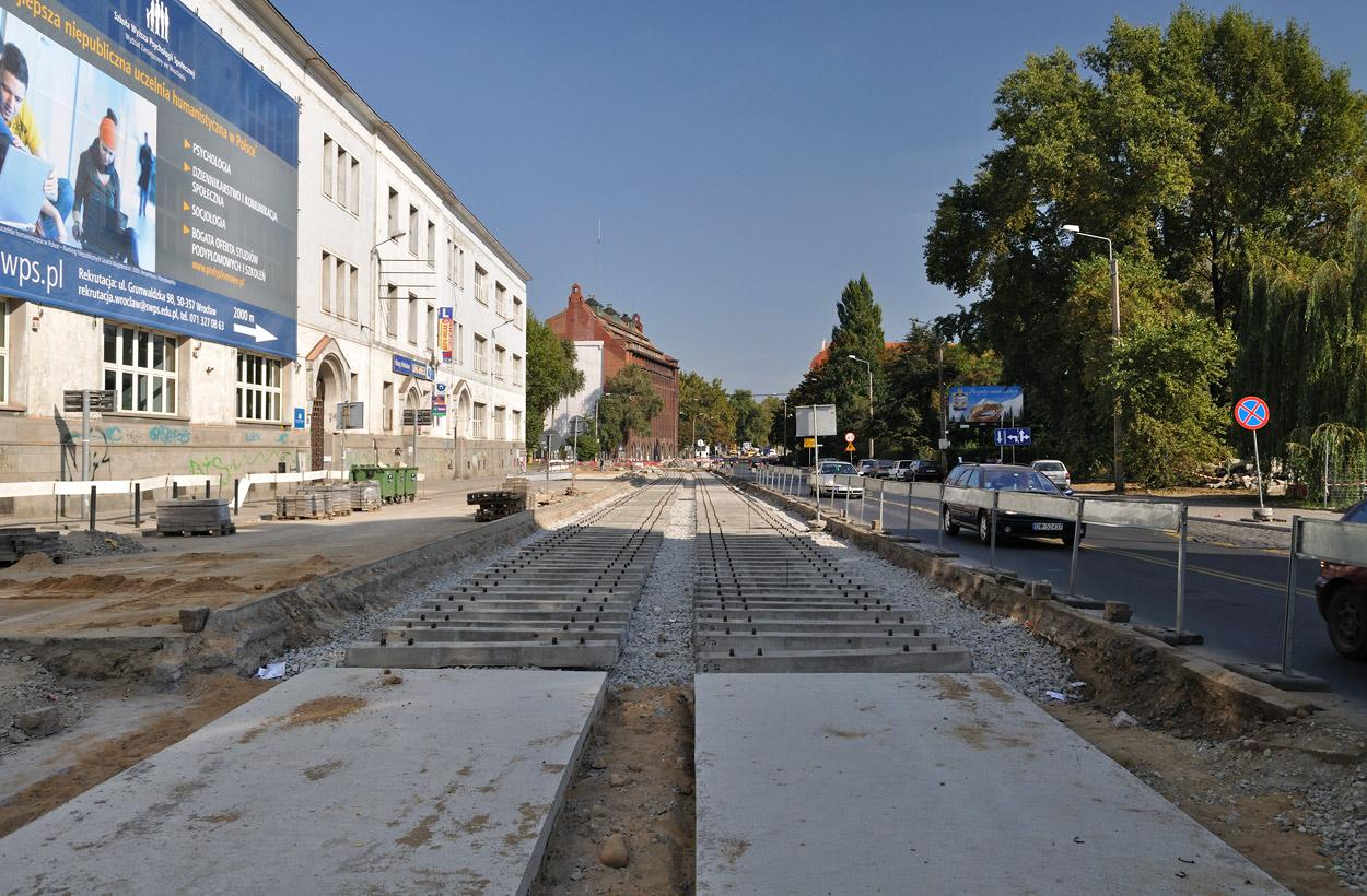 Remont ulicy Sienkiewicza tuż przy placu Bema. Widok w stronę skrzyżowania z ulicą Świętokrzyską.